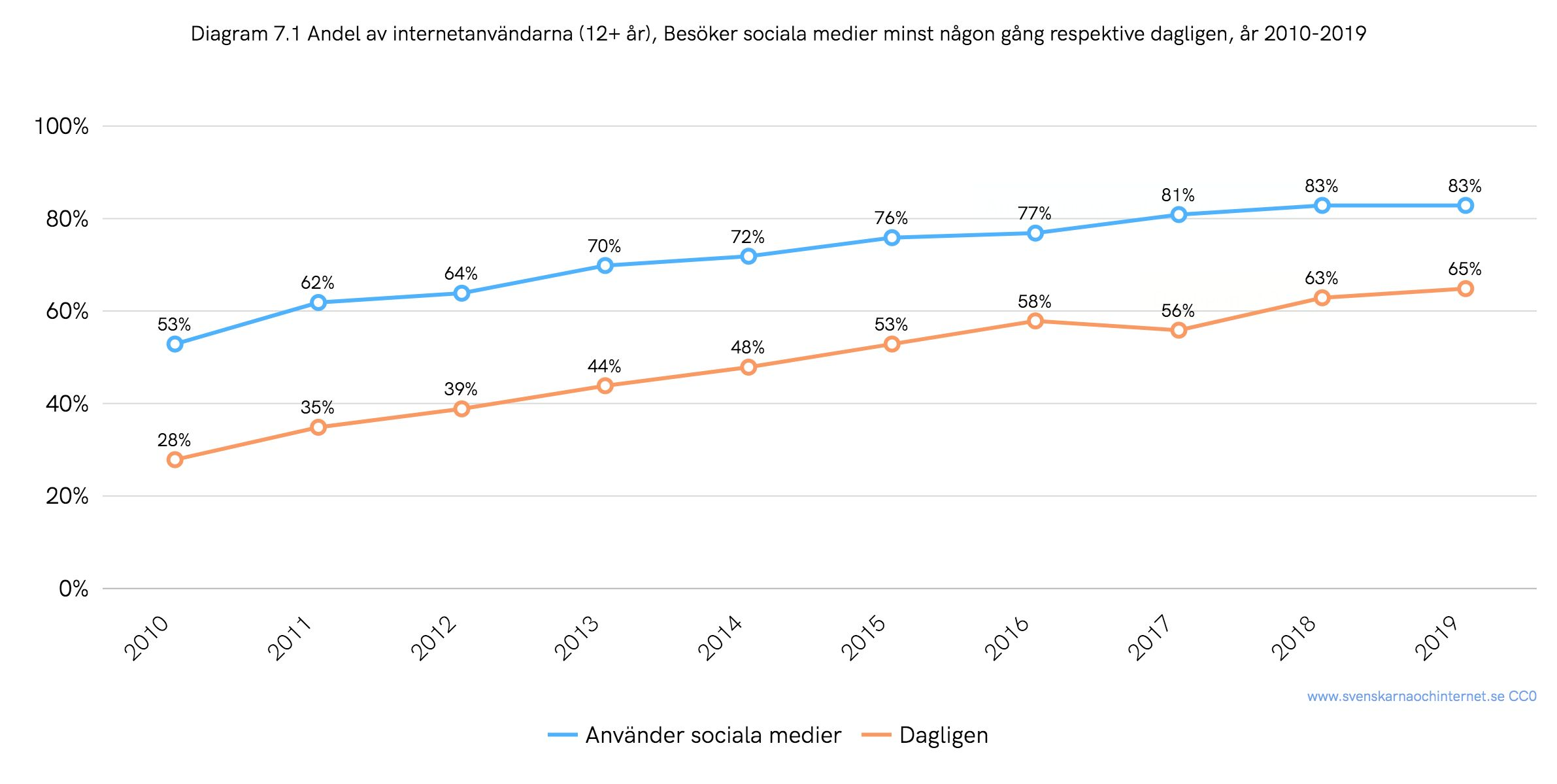 Andel av de svenska internetanvändarna (12+ år) som besökte sociala medier minst någon gång respektive dagligen, år 2010–2019. Siffror från undersökningen "Svenskarna och internet".